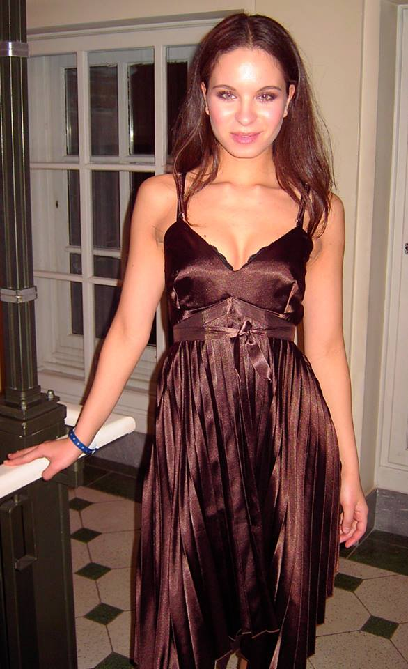 Nina Maleika vor einem Auftritt